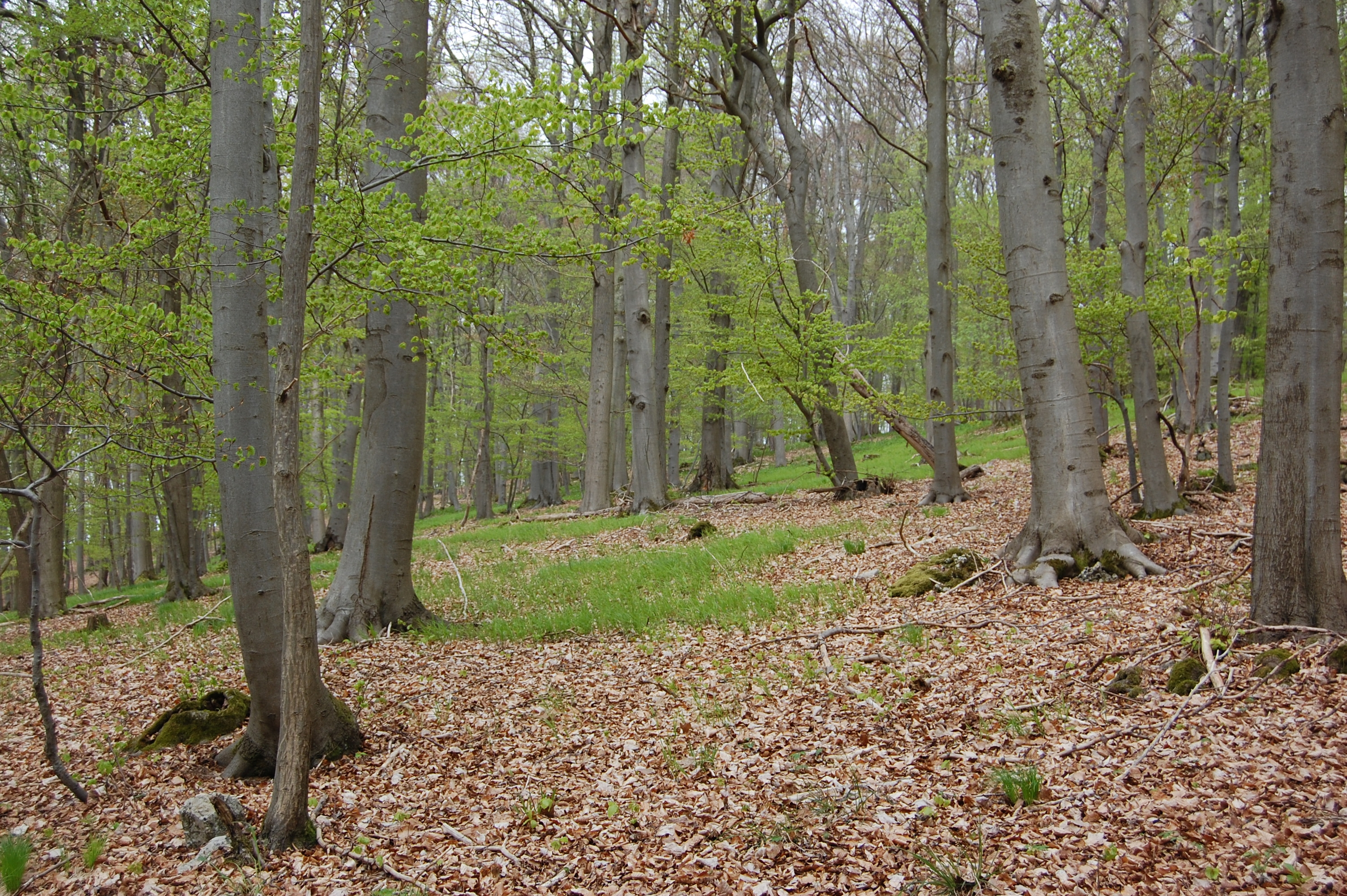 Kalkbuchenwald am Erbberg bei Breitau